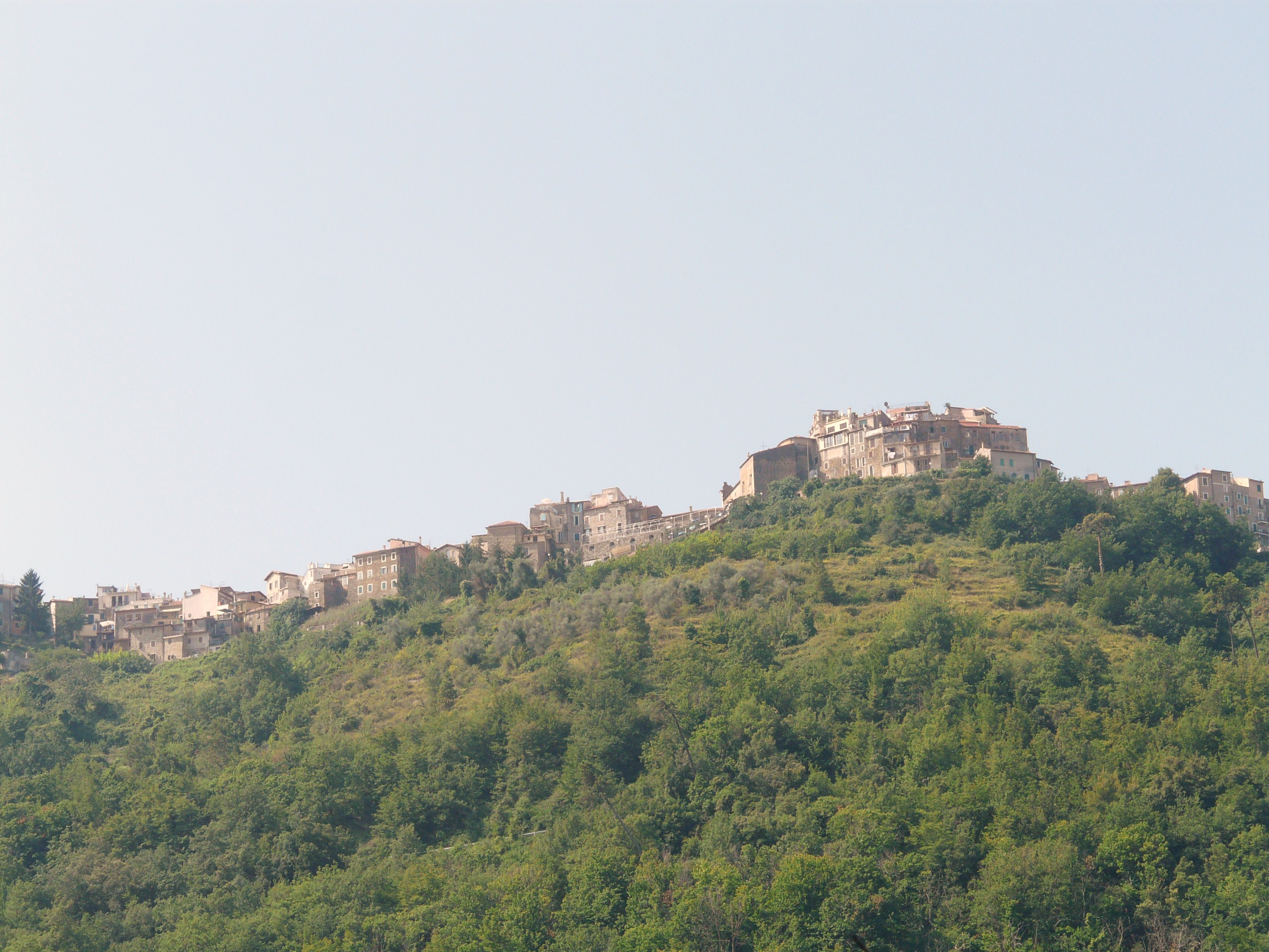 Panorama di Perinaldo, Liguria, Italia